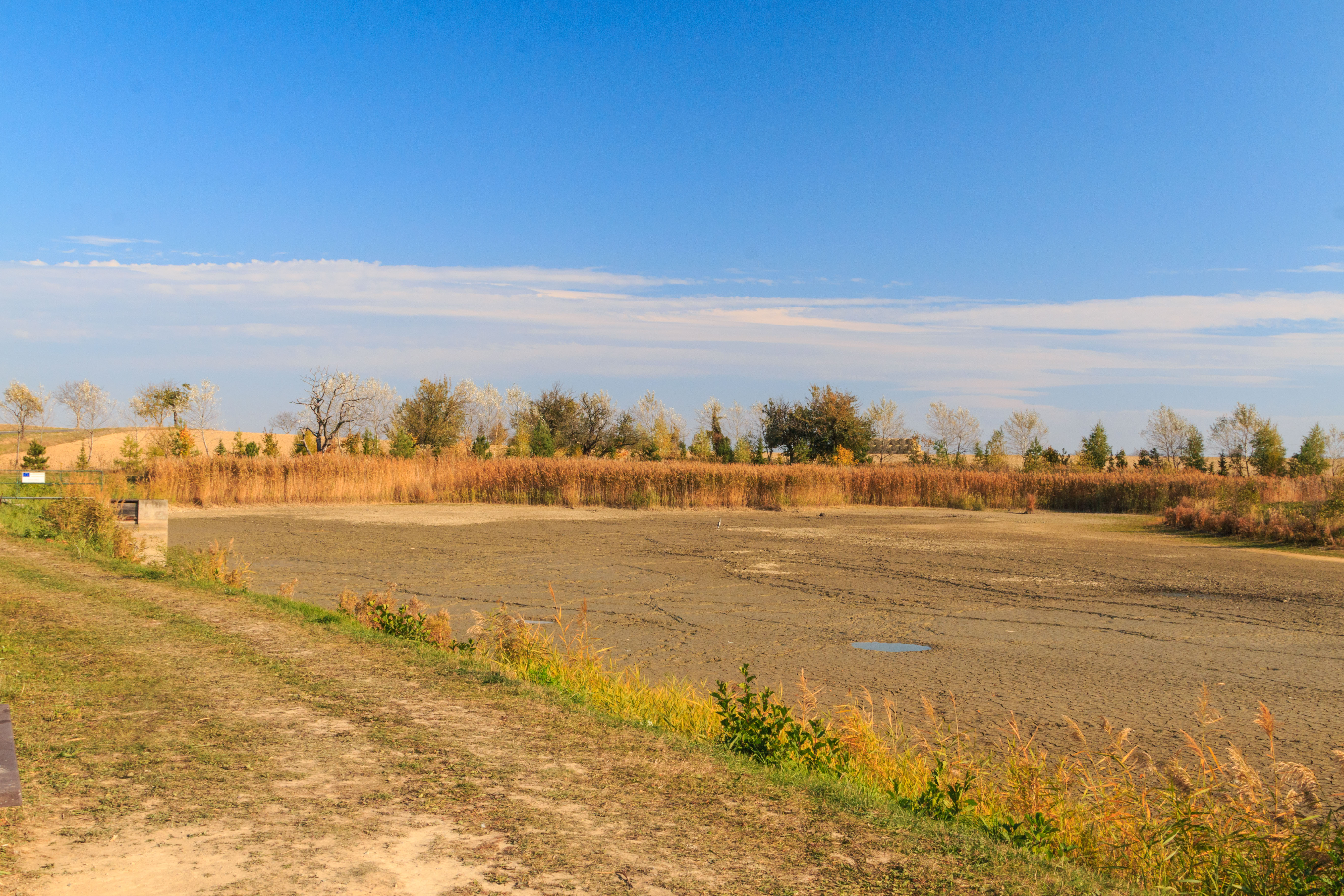 Rybník Eliška u Zaječic Project: Vodstvo. Ticket: 1617.